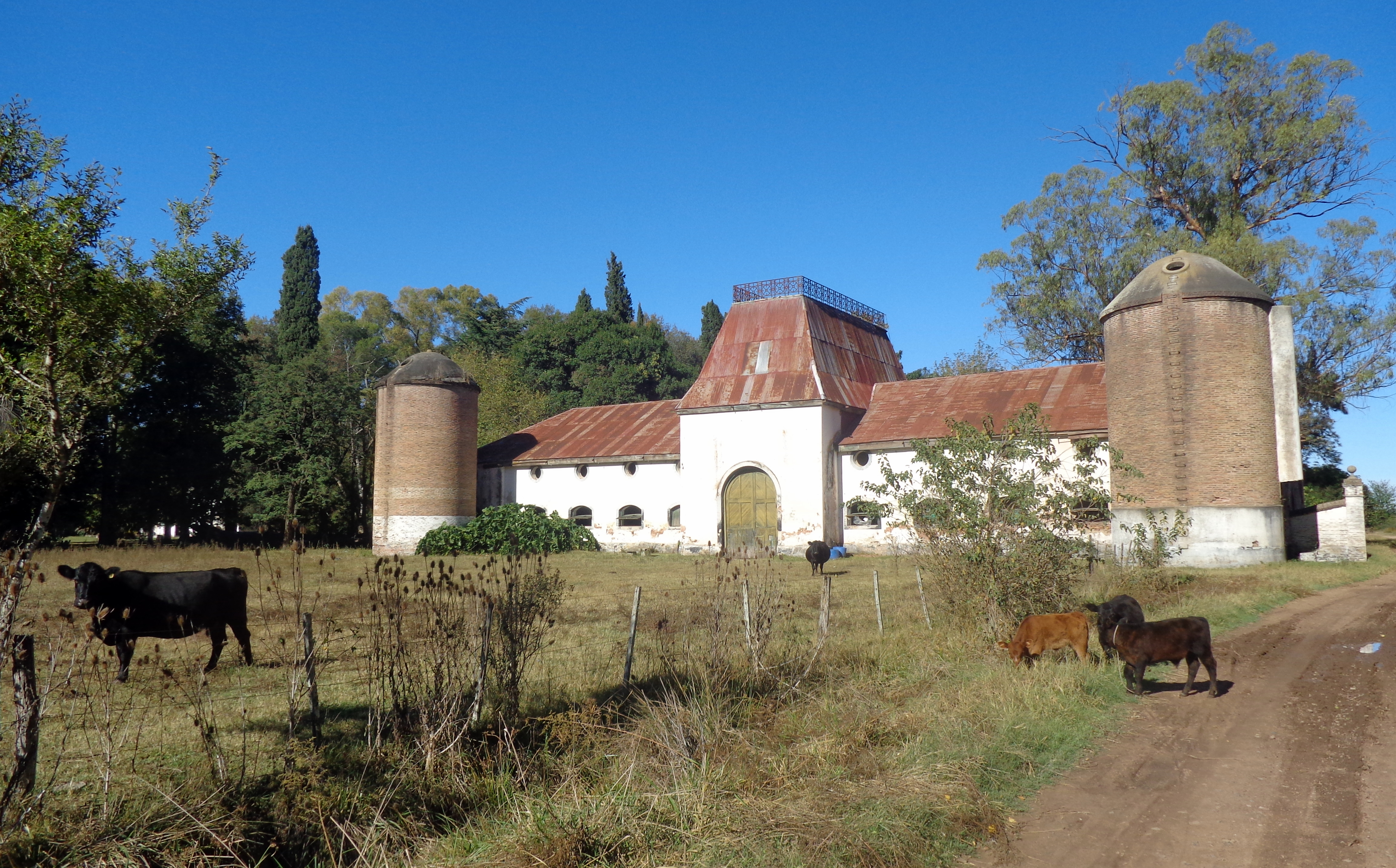 Galpones de la estancia San Martín, origen de La Martona, en Vicente Casares, Cañuelas, provincia de Buenos Aires, Argentina.